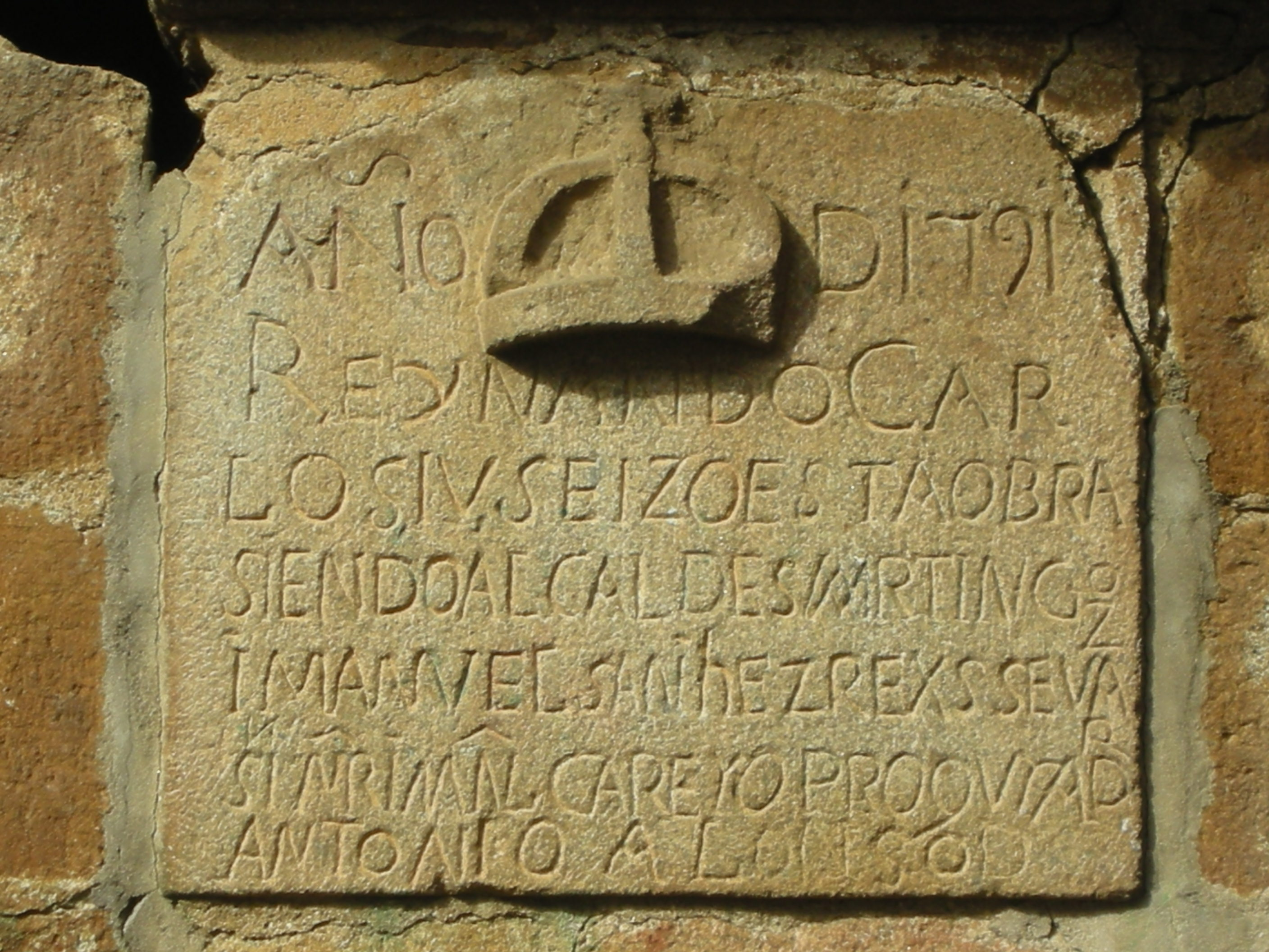 Stèle de la Fontaine du Pilon de la commune de Sotoserrano en Espagne